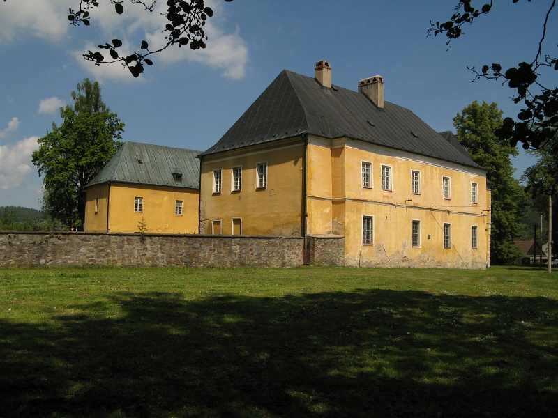 Zámek Brantice, Brantice 33